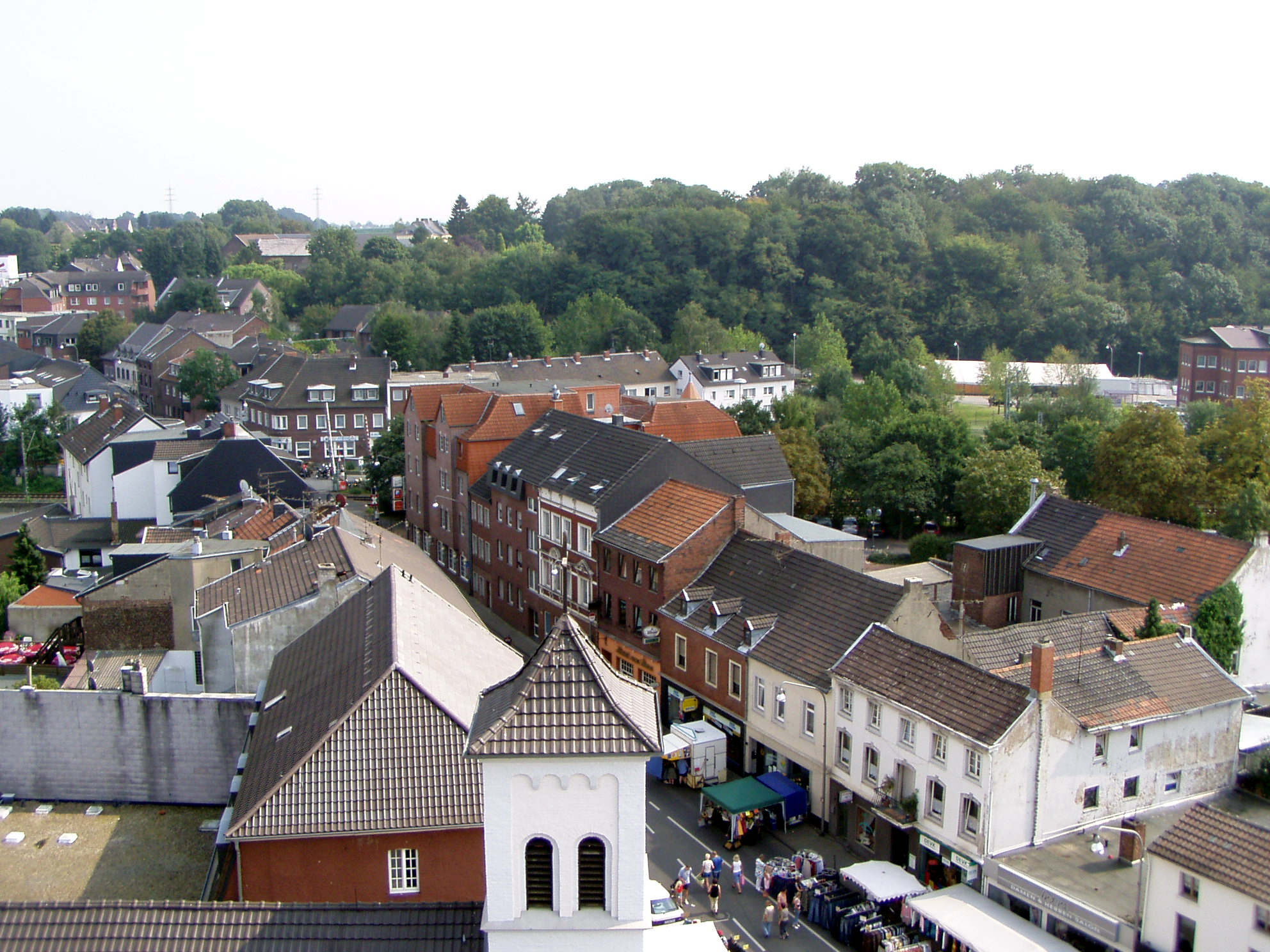 Geilenkirchen, Blick in westlicher Richtung auf die Konrad-Adenauer-Straße, Standort Einmündung Nikolaus-Becker-Straße, Aufnahme aus dem Korb der Feuerwehrleiter, ca. 25–30 m Höhe